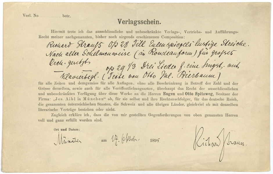 "Verlagsschein" mit Eintragungen. München 17.X.1895. "... Hiermit trete ich das ausschliessliche und unbeschränkte Verlags-, Vertriebs- und Aufführungs-Recht meiner nachgenannten, bisher noch nirgends erschienenen Composition: Richard Strauss Op 28 Till Eugenspiegels lustige Streiche. Nach alter Schelmenweise (in Rondeauform) für großes Orch. gesetzt. - op 29 1/3 Drei Lieder f. eine Singst., mit Klavierbegl. (Texte von Otto Jul. Bierbaum) - für alle Zeiten und demgemäss für alle Auflagen ... an die Herren Eugen und Otto Spitzweg, Besitzer der Firma 'Jos. Aibl in München' ab ...".